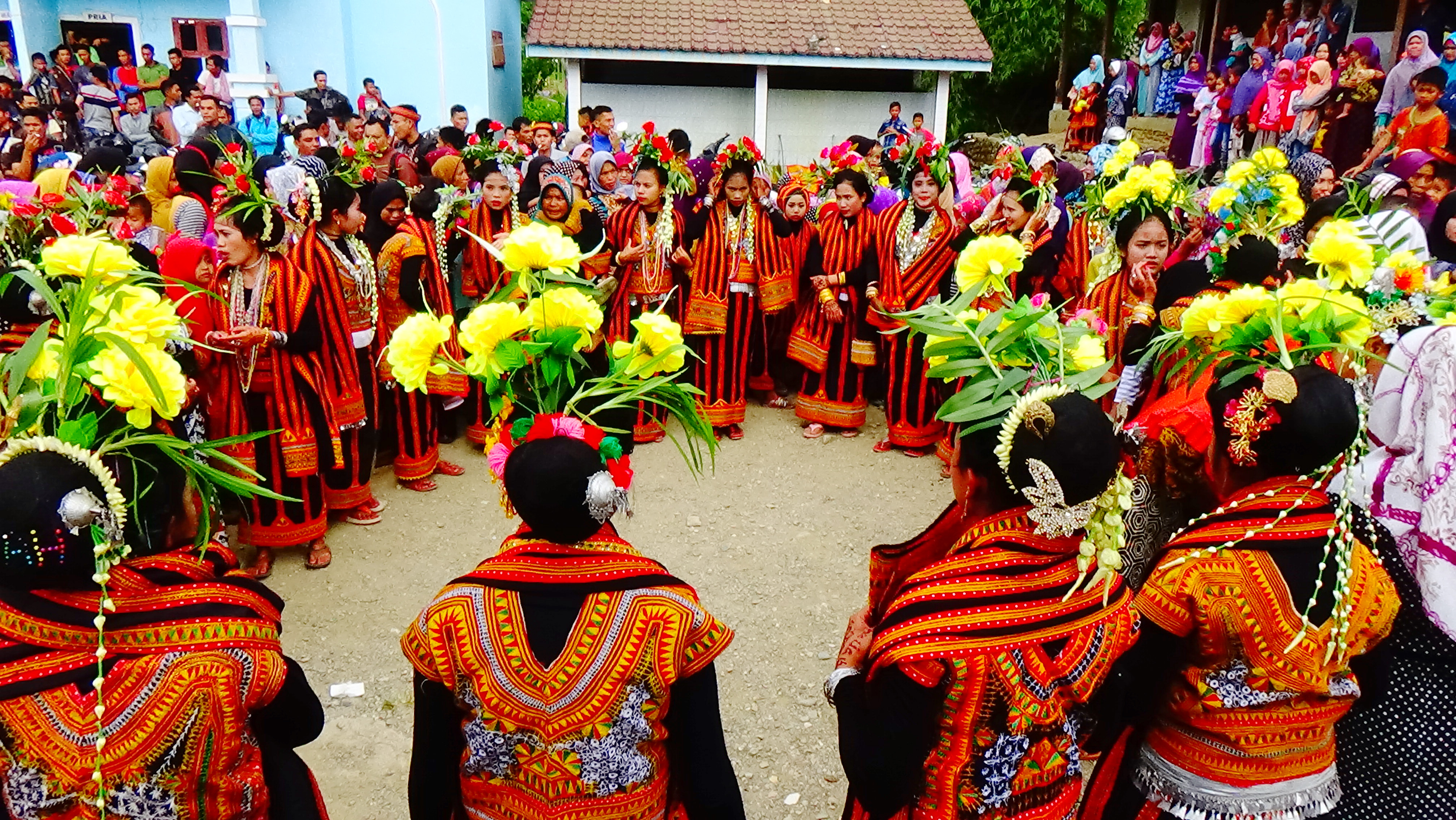 Budaya yang dimainkan oleh gadis-gadis desa di Kabupaten Gayo Lues, Aceh